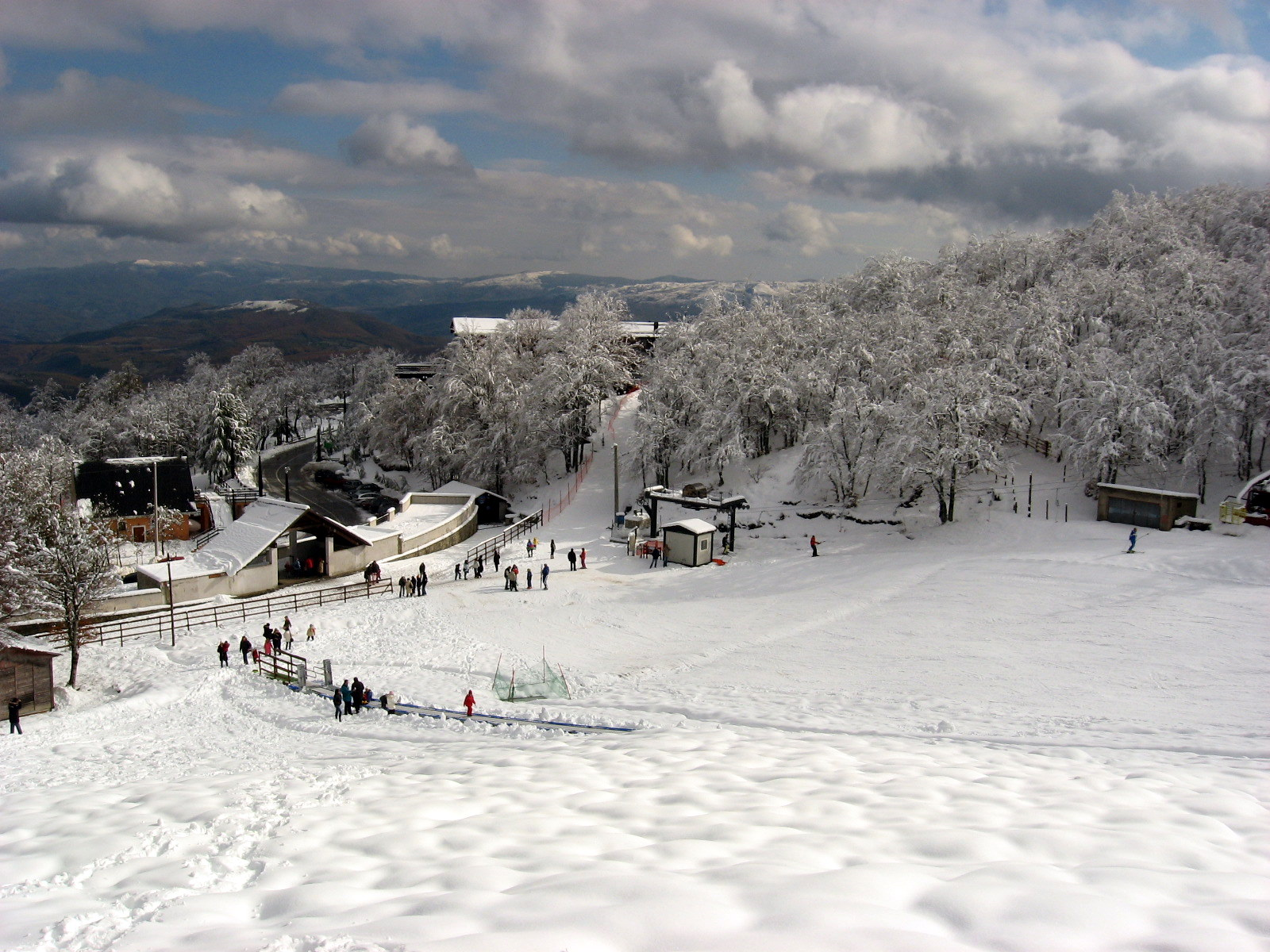 Comprensorio sciistico Sellata-Arioso - Monti della Maddalena (Potenza)